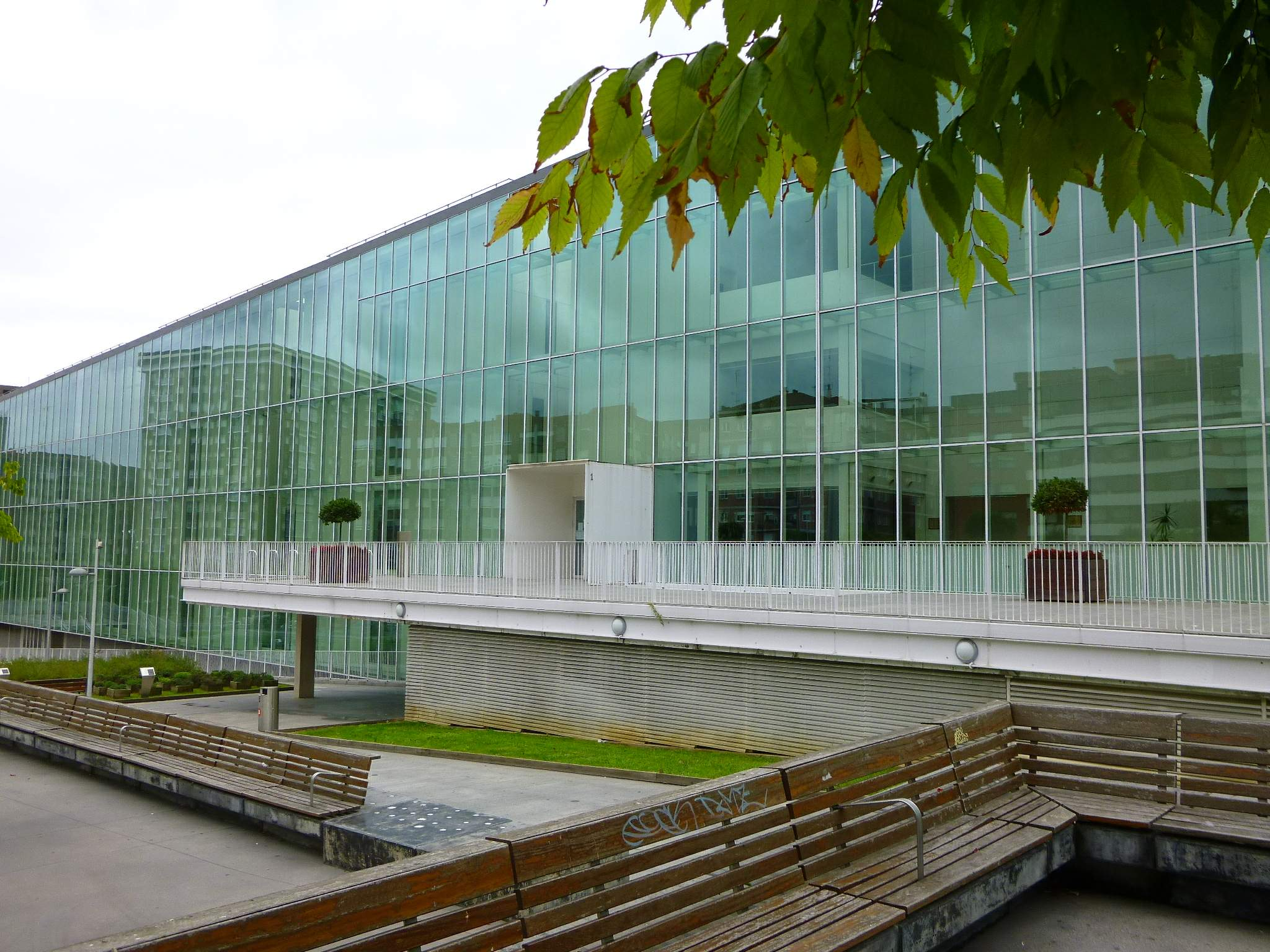 Conservatorio de Música Juan Crisóstomo de Arriaga, en la Plaza Ibarrekolanda de Bilbao